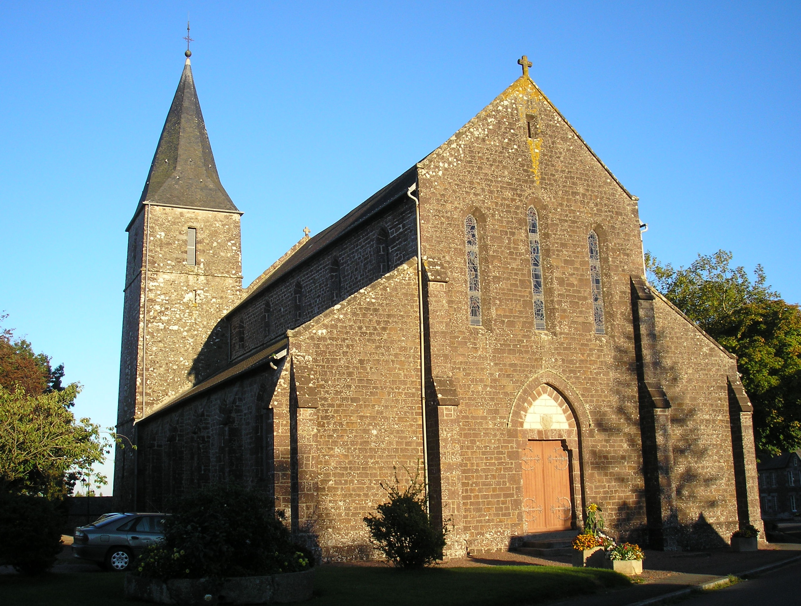 Saint-Denis-le-Gast (Normandie, France). L'église Saint-Denis.